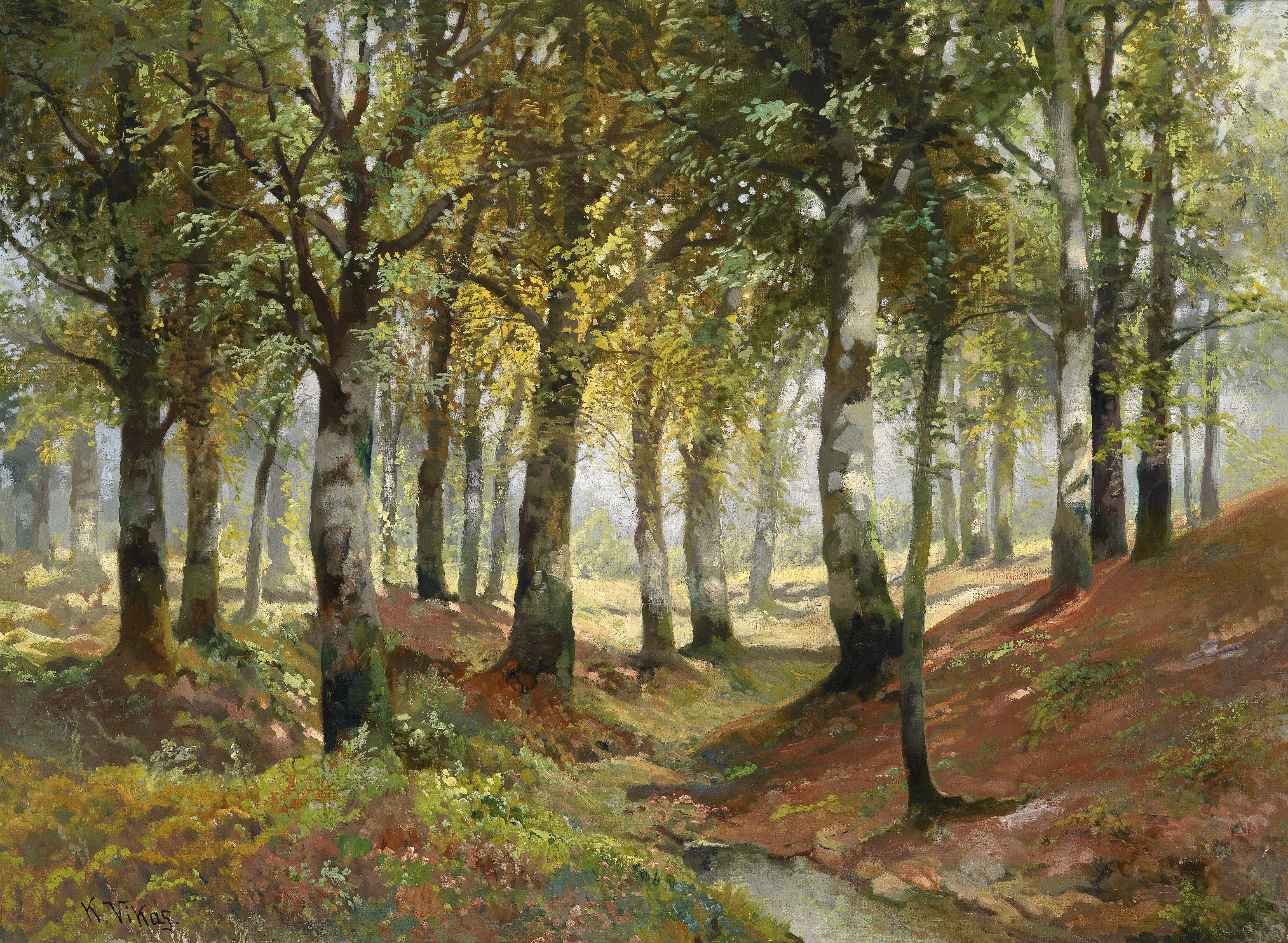 Sonnendurchflutete Waldlandschaft